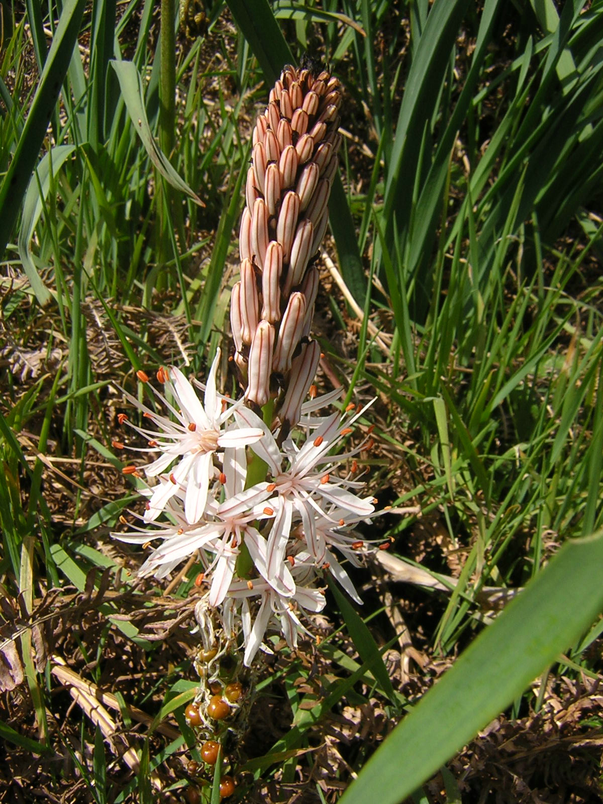 Description =Asphodelus albus Source =Photo taken by Remi Jouan Date =Avril 2004 Author =Remi Jouan Au jeu des éliminations, vu la symétrie trimère des fleurs et l'allure de la feuille au premier plan dont on peut supposer qu'elle appartient à la plante, on peut éliminer toutes les dicotylédones et se diriger plutôt vers les Liliacées. Voir asphodèle. C'est peut-être l'asphodèle d'Arrondeau vu sa localisation (cf cette photo). Si c'est vrai, c'est une plante endémique du Morbihan, protégée au plan national, ce qui signifie qu'il est possible d'en cueillir à condition d'avoir l'autorisation du ministre compétent. Spedona 10 mai 2006 à 18:27 (CEST)